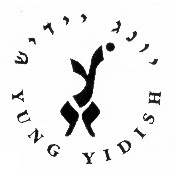 YUNG YiDiSH Logo